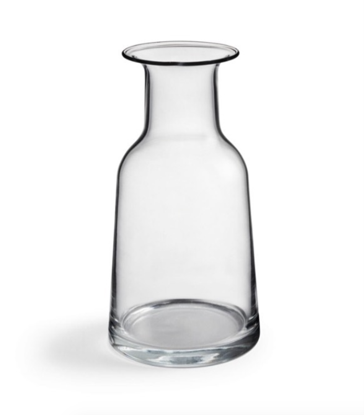 Decanter